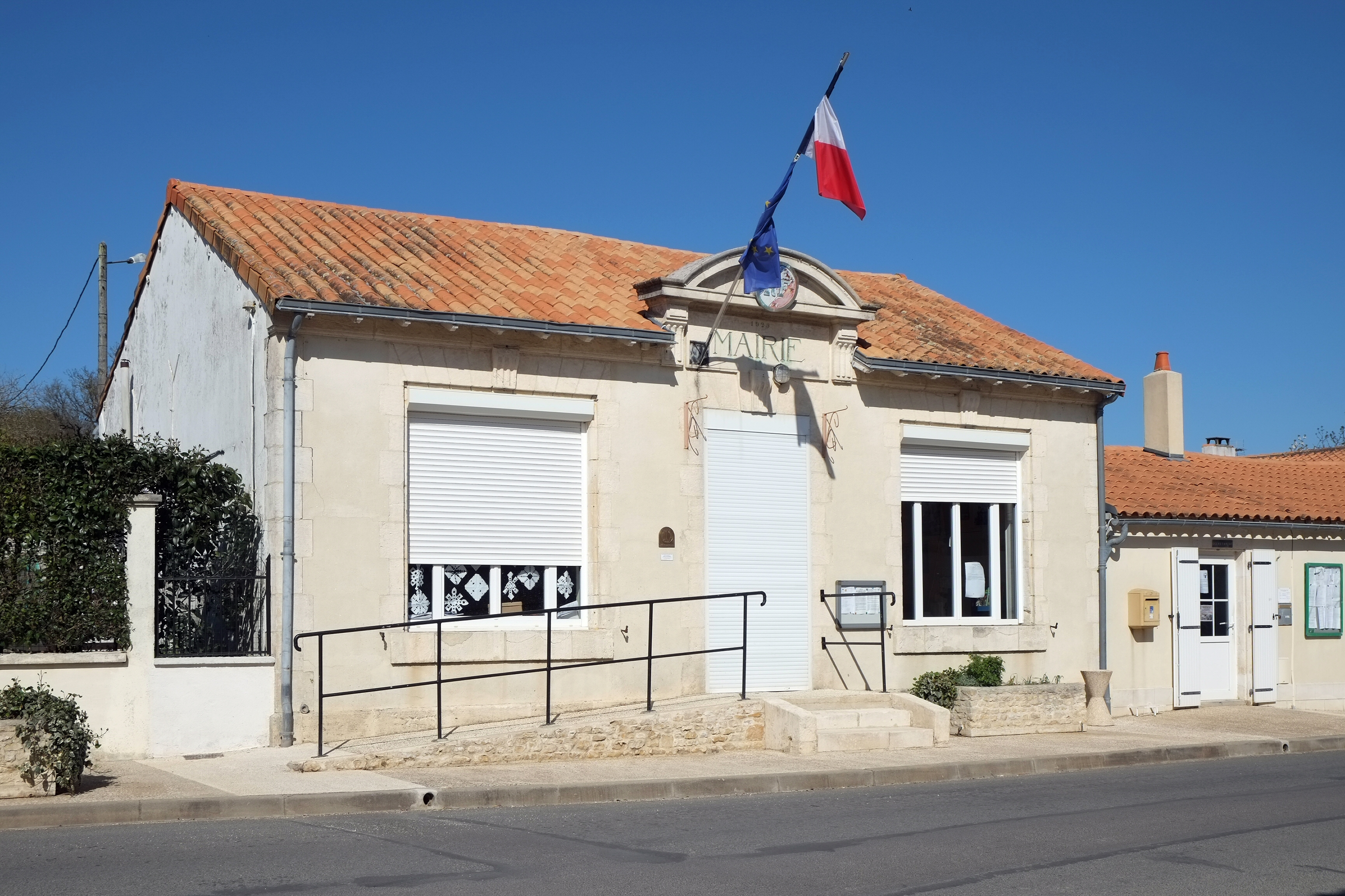 Mairie Montroy Charente-Maritime France